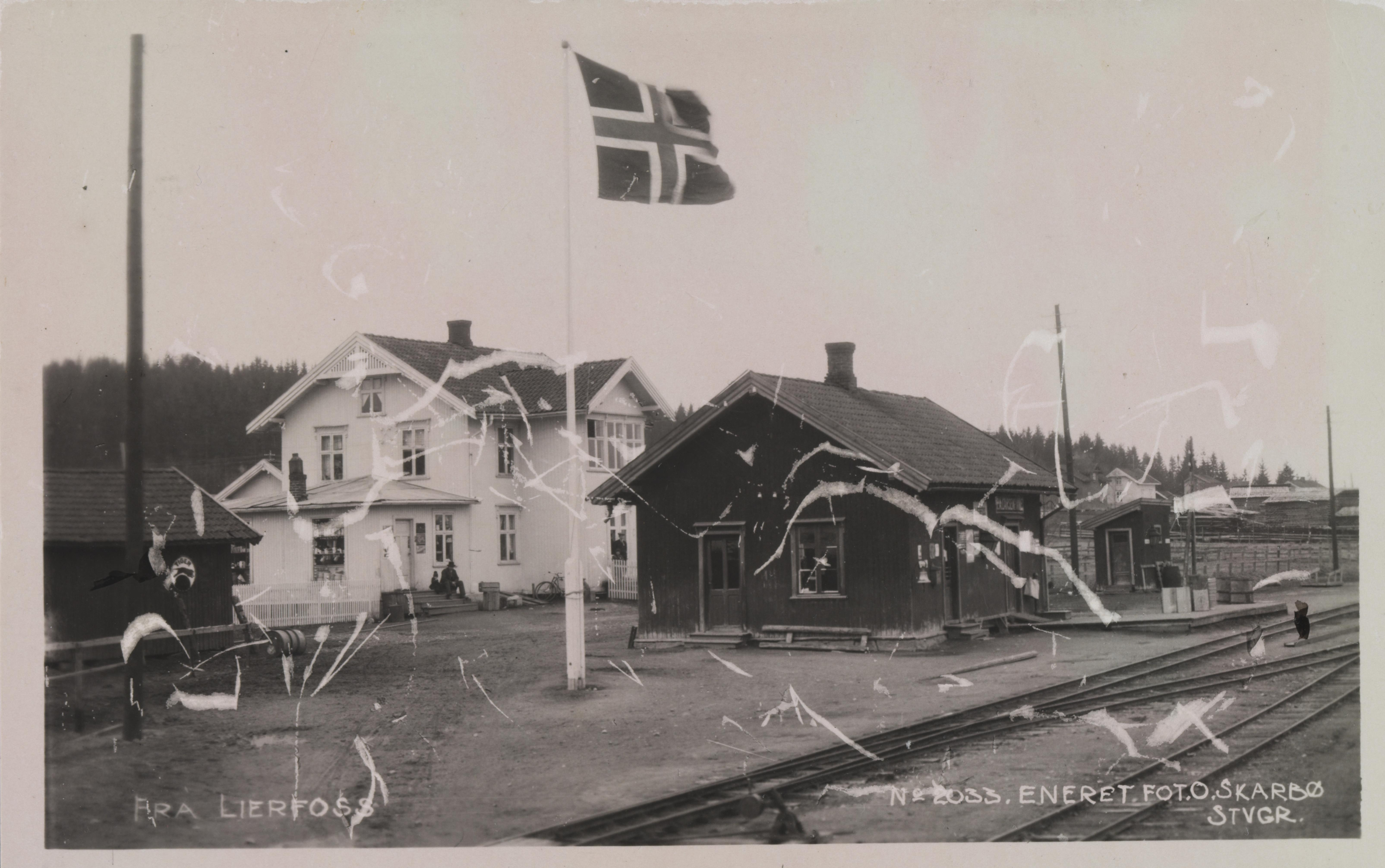 Bildet er hentet fra Nasjonalbibliotekets bildesamling Lierfoss,Lierfoss stasjon, Aurskog-Høland, Akershus